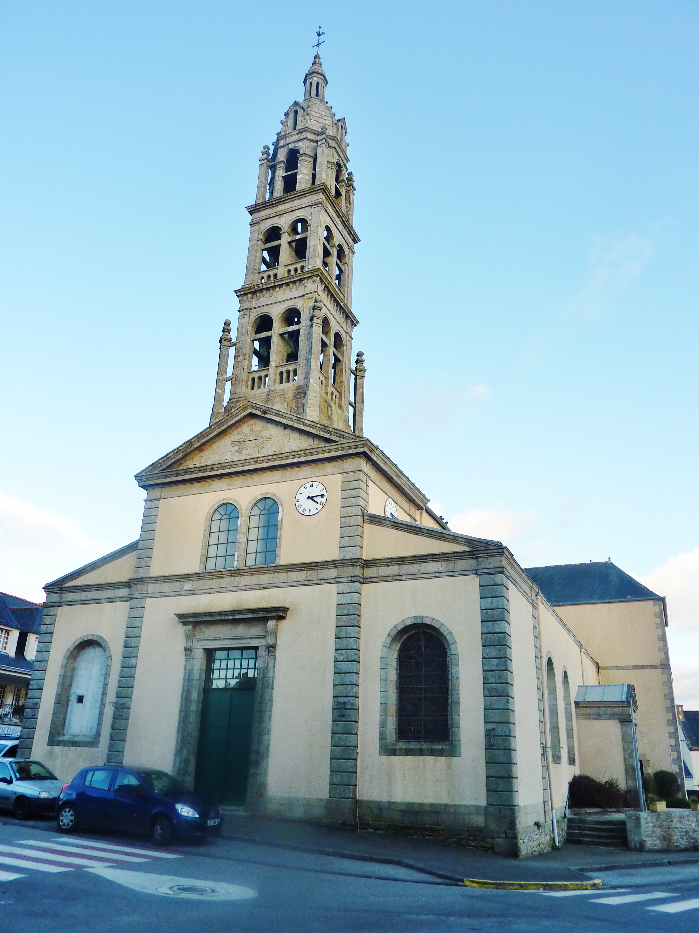 L'église paroissiale Saint-Enéour de Plonéour-Lanvern (construite en 1847 et consacrée en 1848).